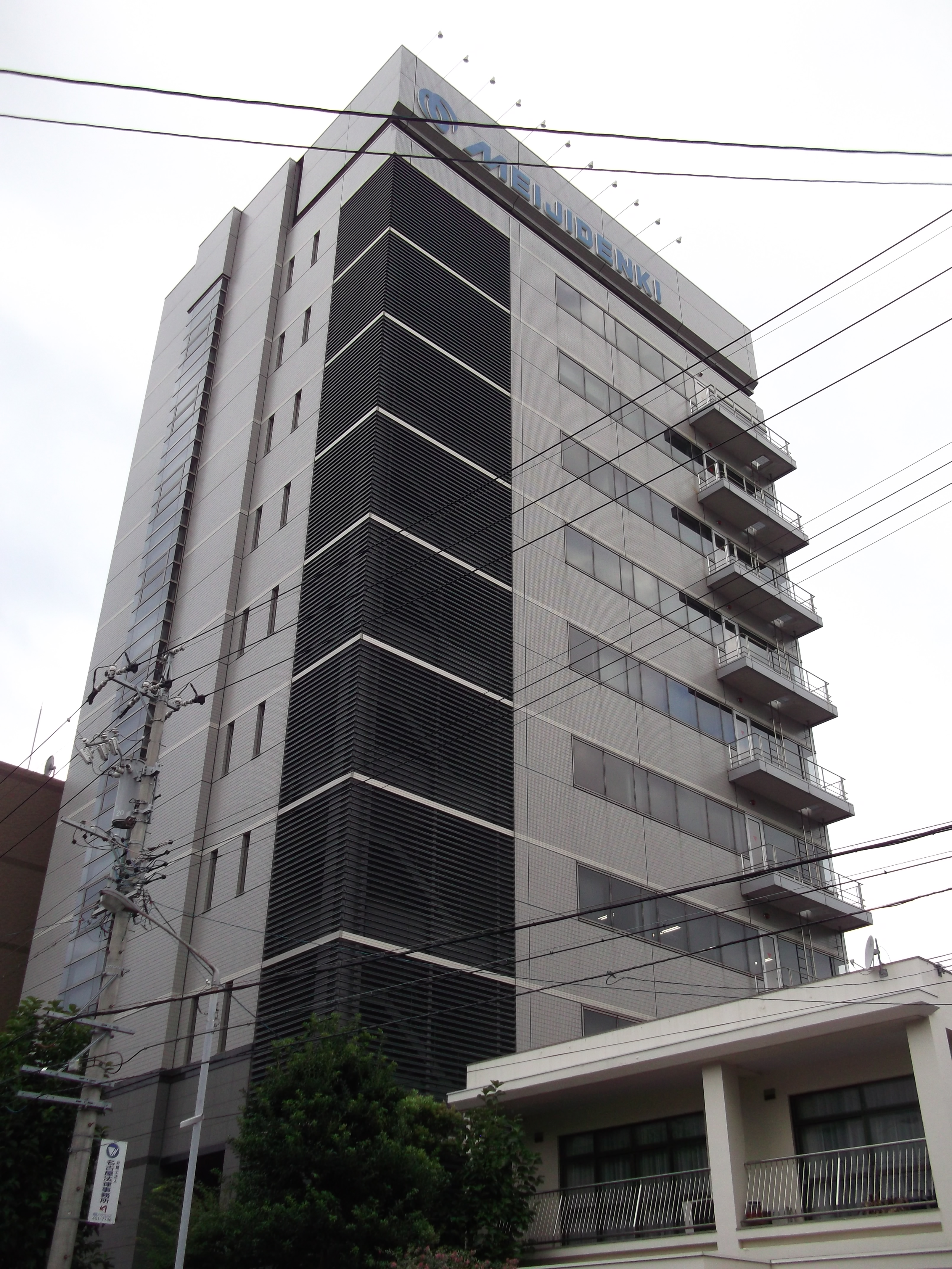 名古屋市中村区亀島の明治電機工業本社を南側公道東側より撮影